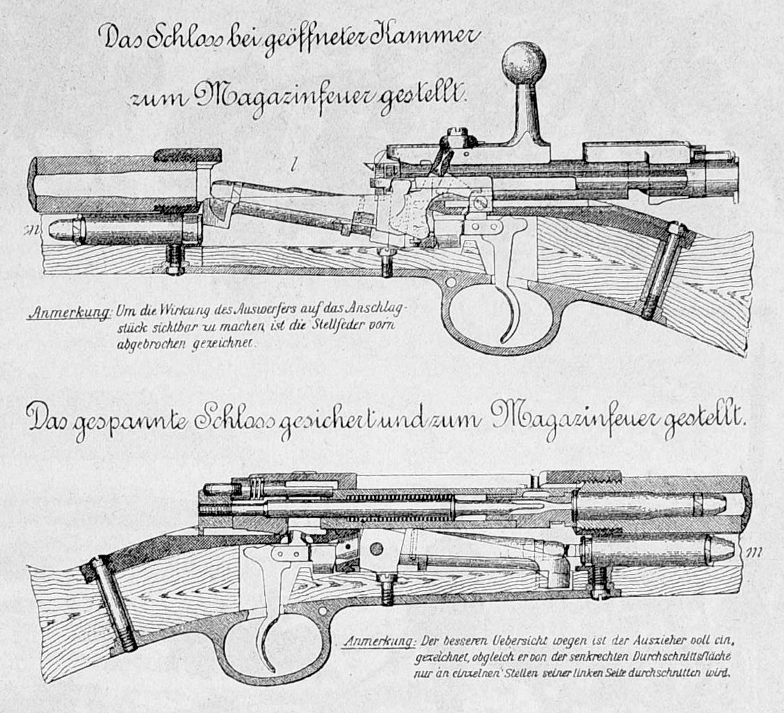 Bild aus Seite 366 in "Die Gartenlaube". Image from page 366 of journal Die Gartenlaube, 1887.